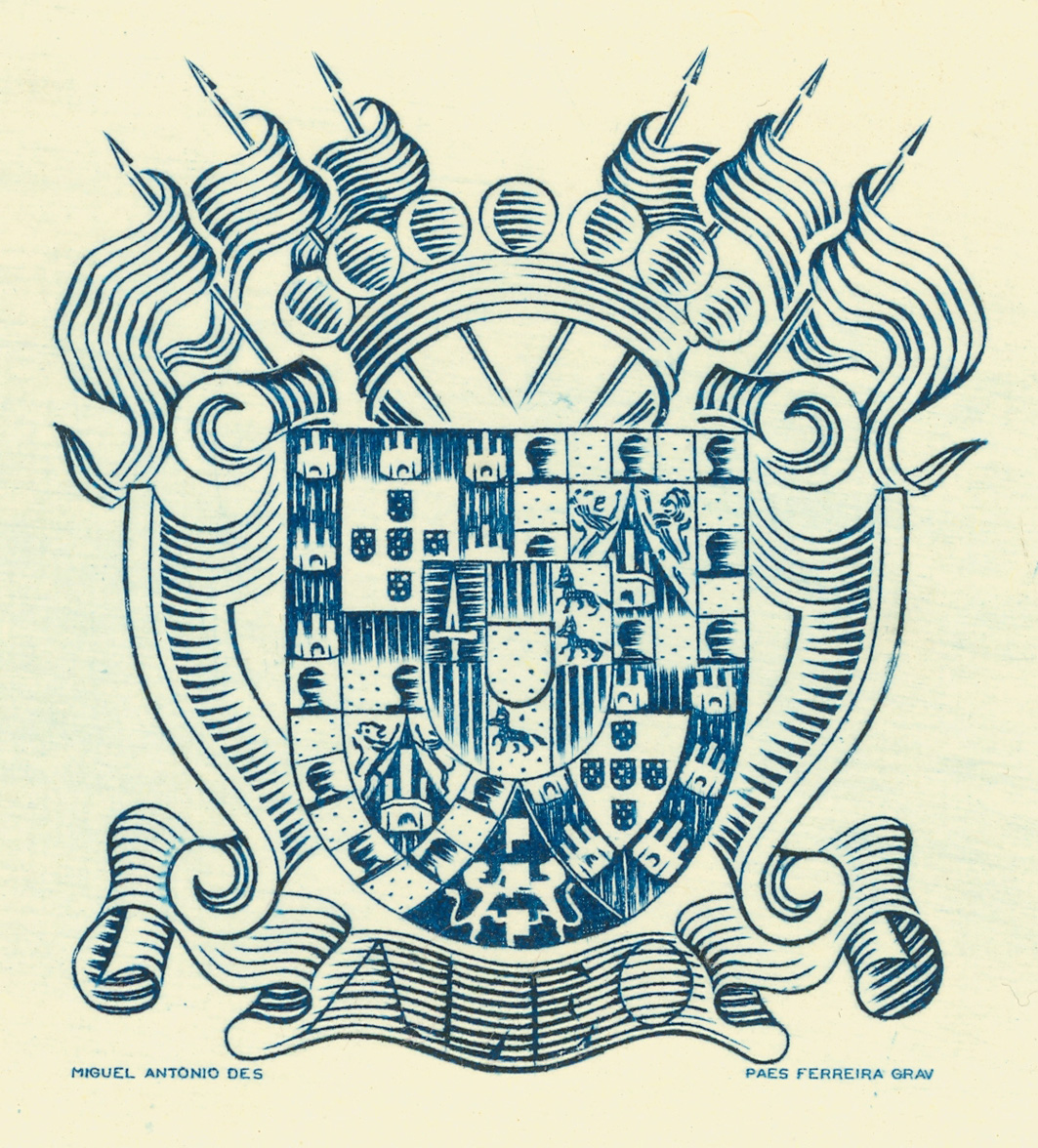 Ex-líbris do Conde de Paraty